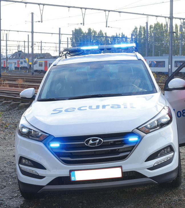 Hyundai Tucson 2.0 CRDi 4WD